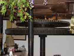 Restes des engrenages du Moulin